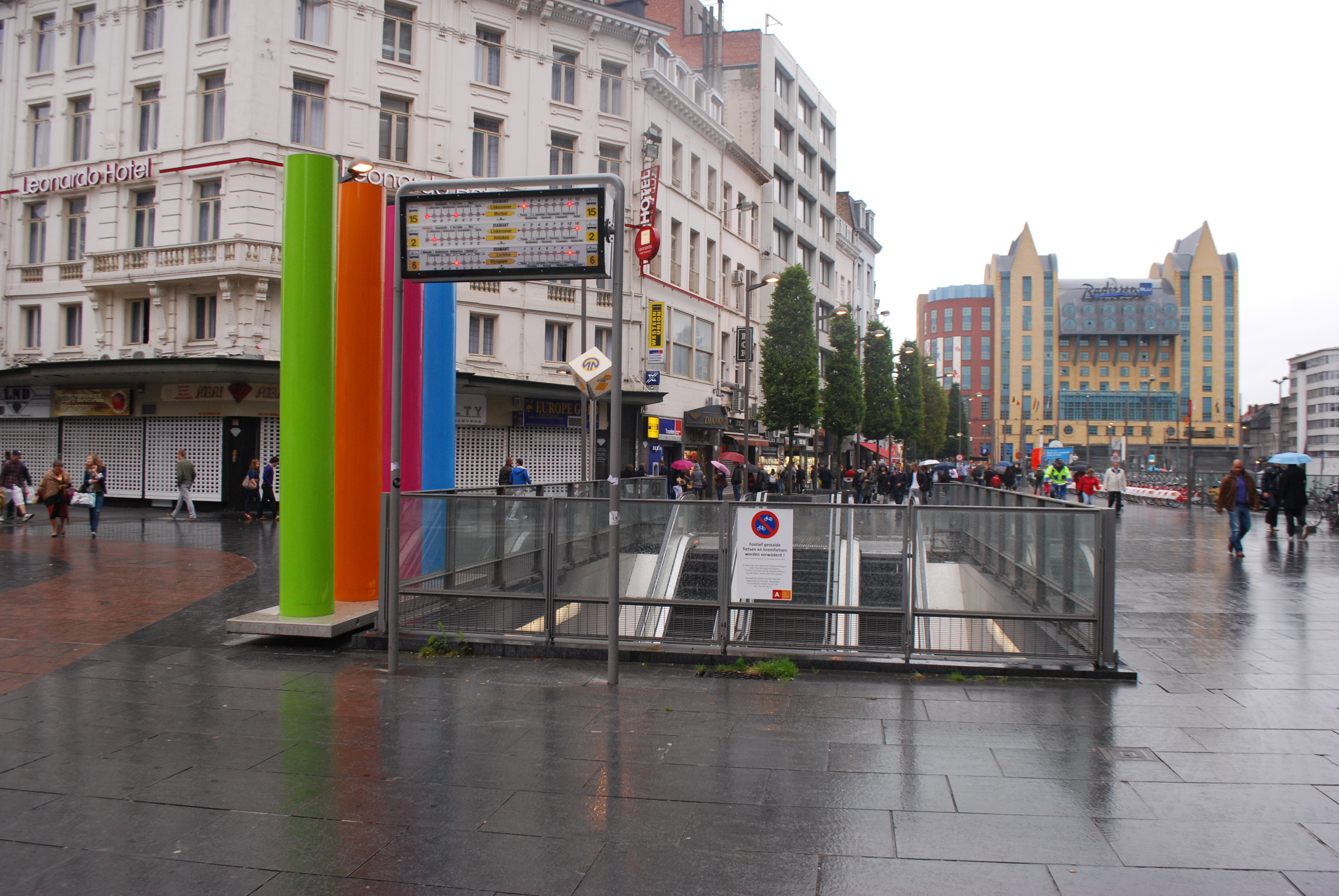 Vue de l'angle entre Keyserlei et Koninfin Astridplein à Anvers.